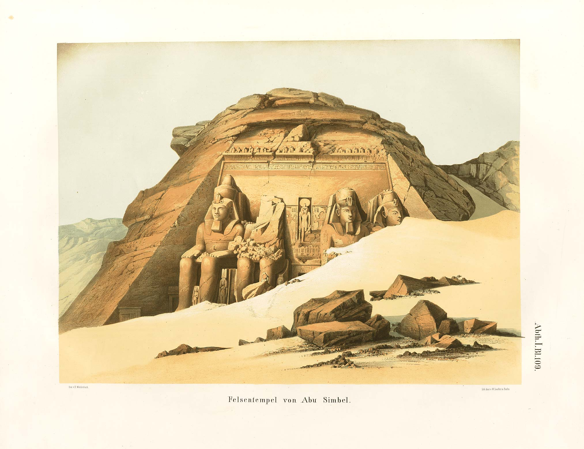 Denkmaeler aus Aegypten und Aethiopien nach den Zeichnungen der von Seiner Majestät dem Koenige von Preussen, Friedrich Wilhelm IV., nach diesen Ländern gesendeten, und in den Jahren 1842–1845 ausgeführten wissenschaftlichen Expedition auf Befehl Seiner Majestät